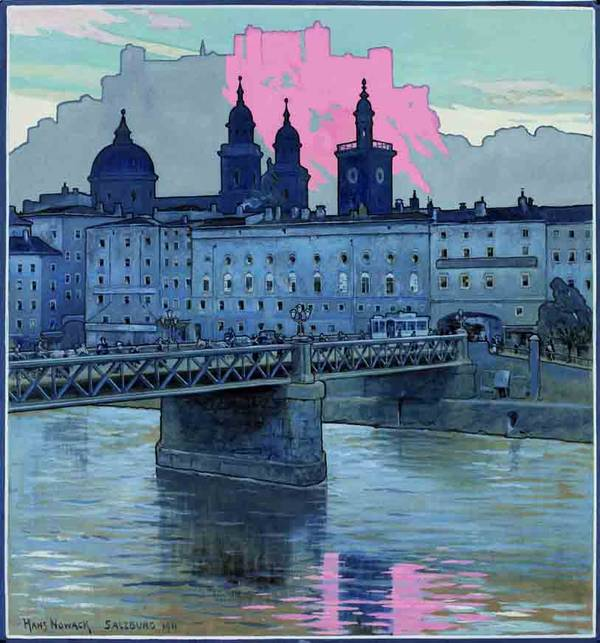 Salzburg mit der alten Staatsbrücke, Rathaus, Dom und Festung